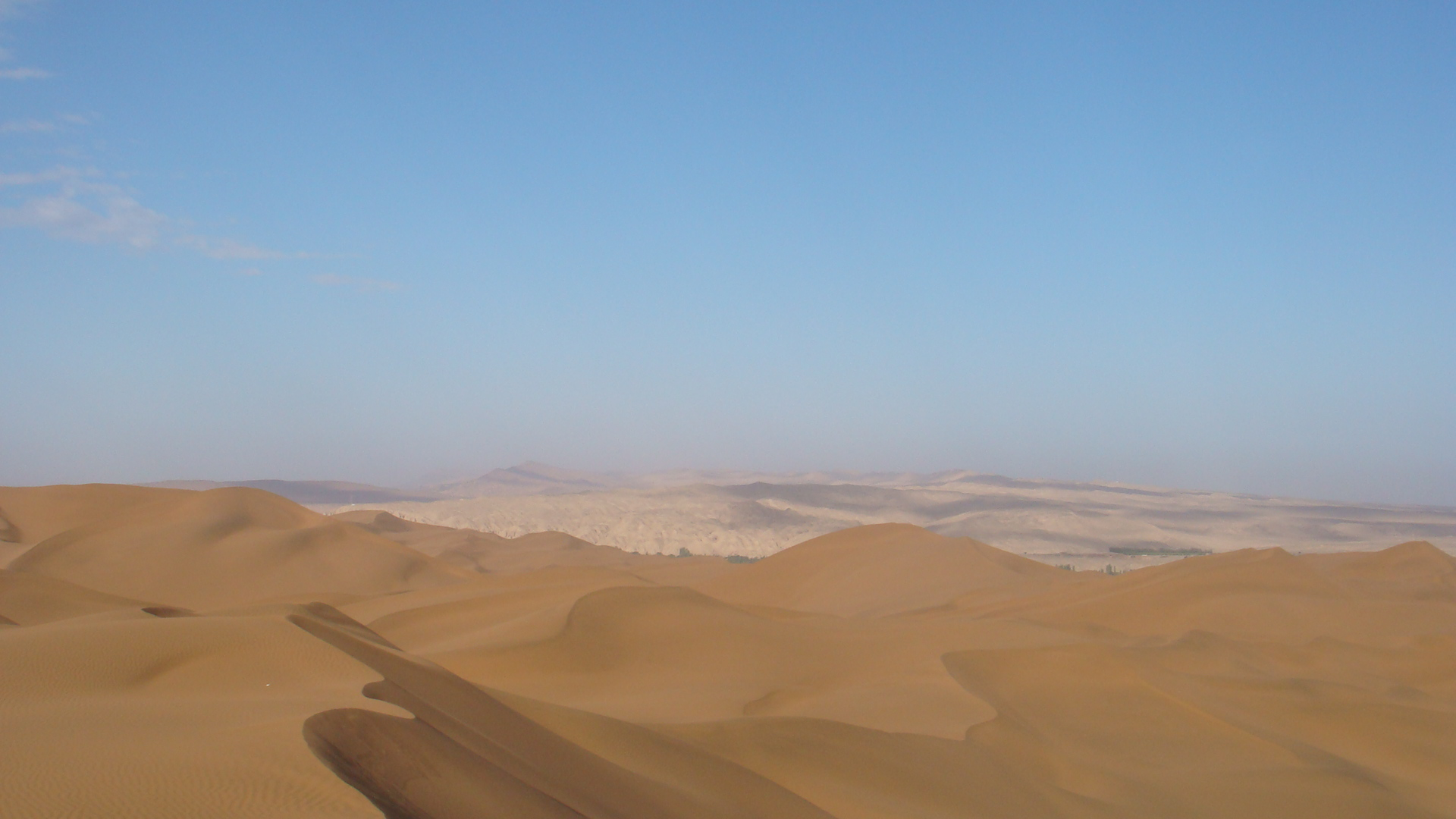 中国新疆鄯善县库木塔格沙漠 China Xinjiang, Piqan County Desert China Xinjiang Urumqi Welcome you to tour the, Китай Синьцзяна Урумчи приветствовать Вас на экскурсию, الصين ترحب زيارتك لاورومتشى فى شينجيانغ, 中国新疆のウルムチへの訪問を歓迎する, 中国新疆乌鲁木齐欢迎您来观光旅游，